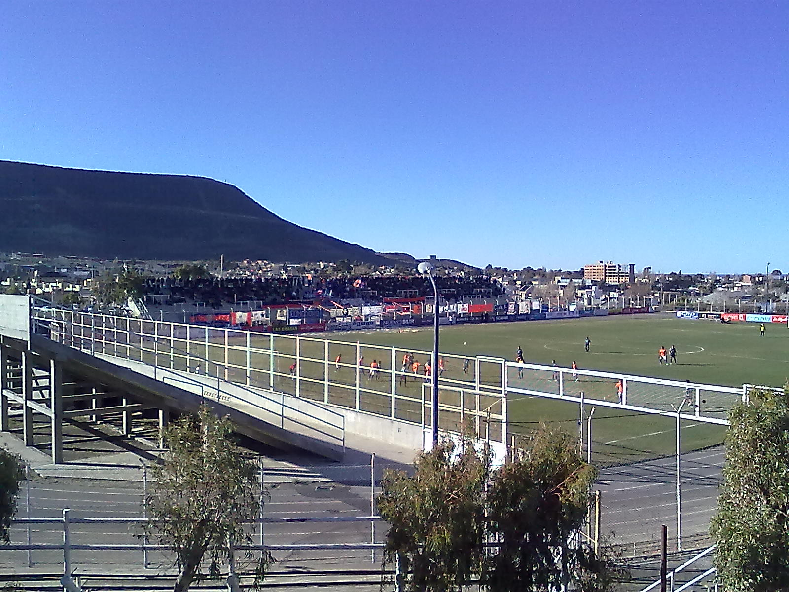 la cai jugando en el estadio municipal de comodoro